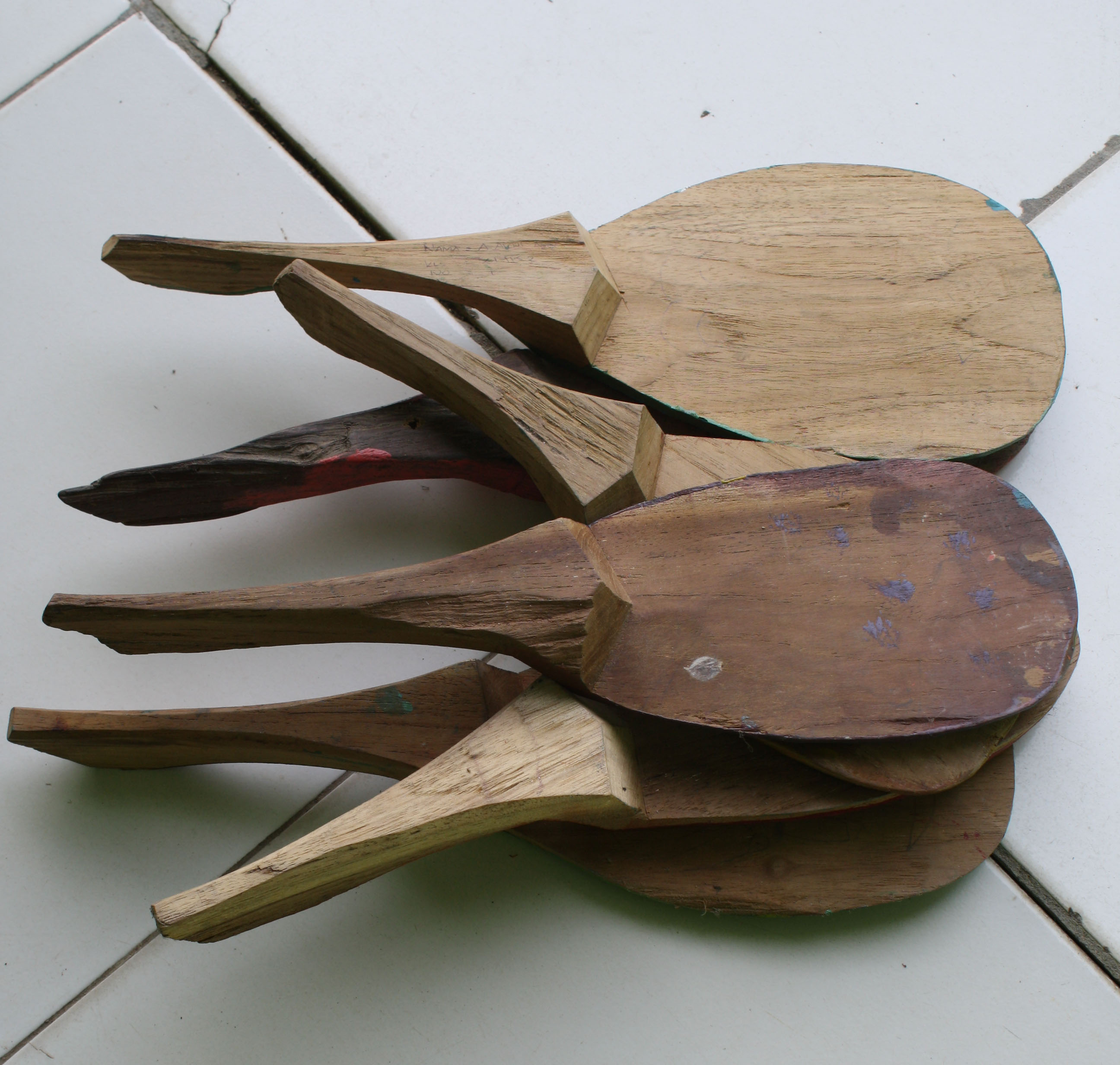 Entong adalah alat yang dipakai untuk mengambil nasi di Daerah Jawa Tengah Indonesia